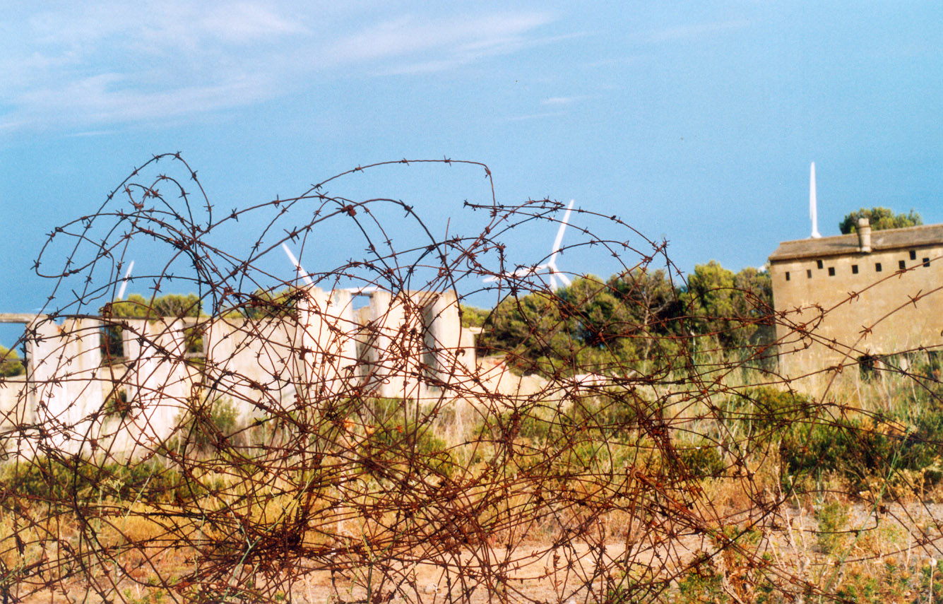 Camp de Rivesaltes o Camp Joffre, situation entre Rivesaltes et Salses.